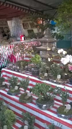 Barraca de artesanato bonsai na feira da Liberdade